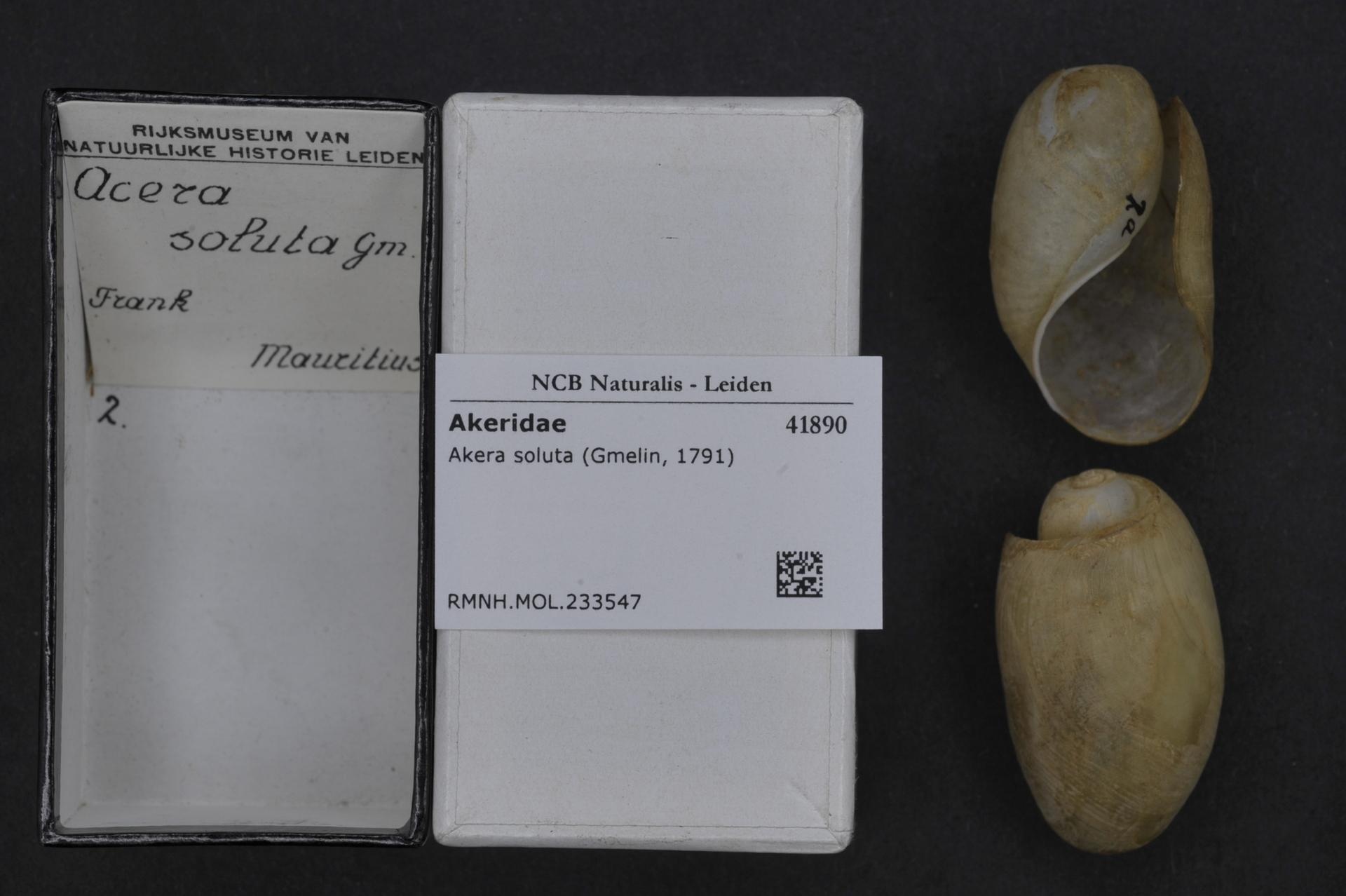 Akera soluta (Gmelin, 1791)